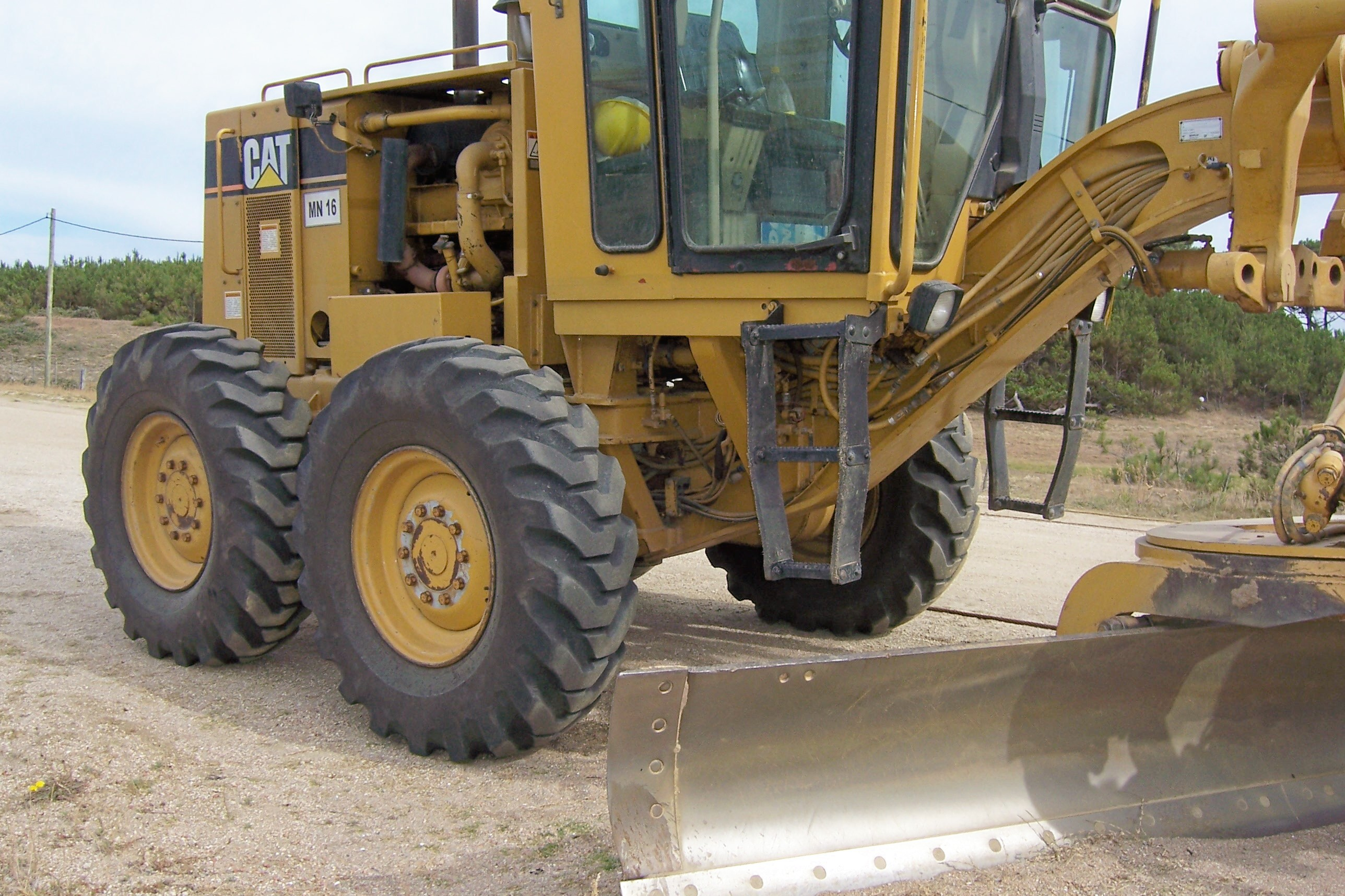 Motoniveladora